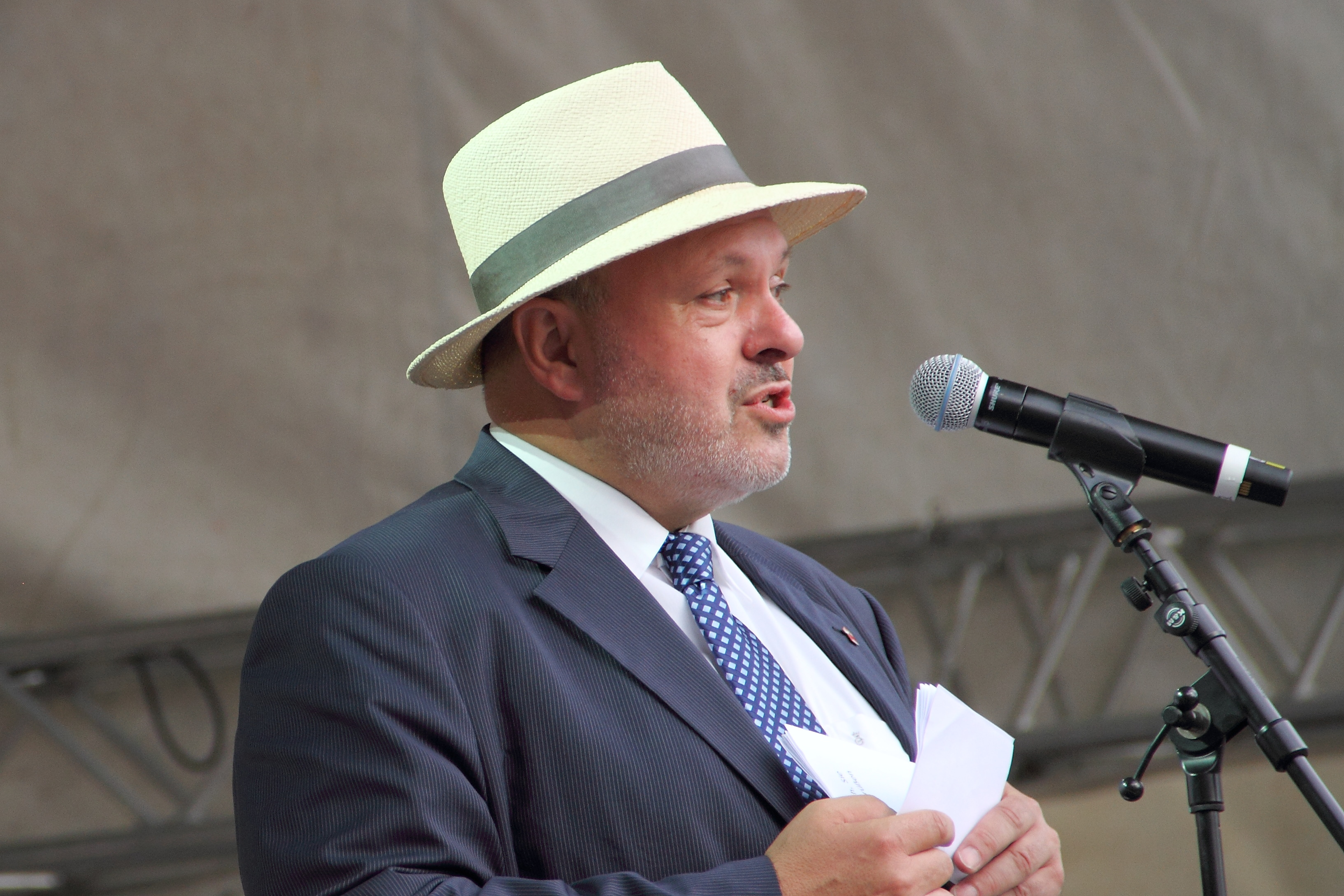 Staatssekretärin Babette Winter und Bürgermeister Jörg Reichl eröffnen das Rudolstadt-Festival 2017.